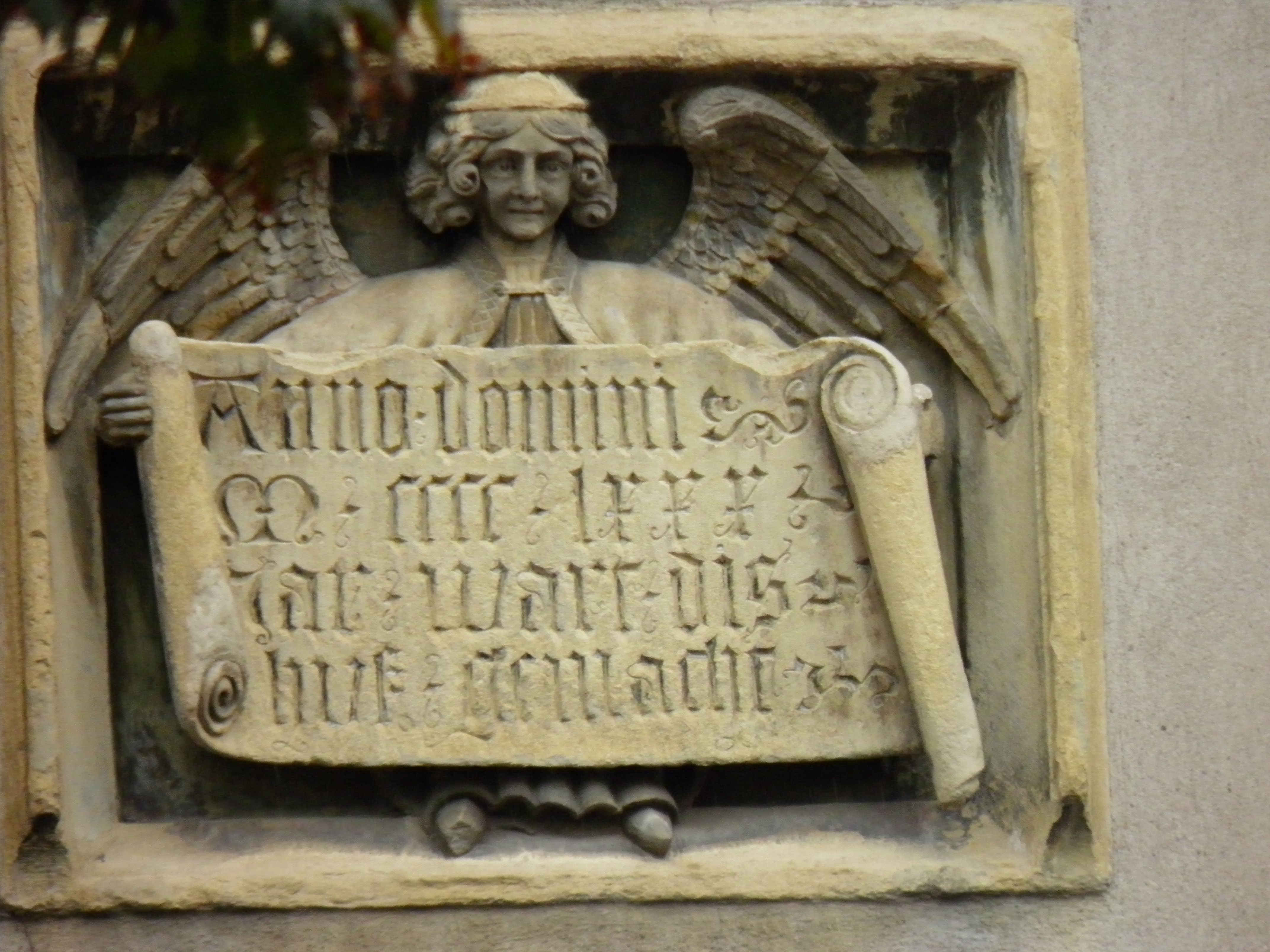 Ange tenant un parchemin mentionnant la date de construction du Koïfhus au 29 Grand-Rue à Colmar (Haut-Rhin, France).